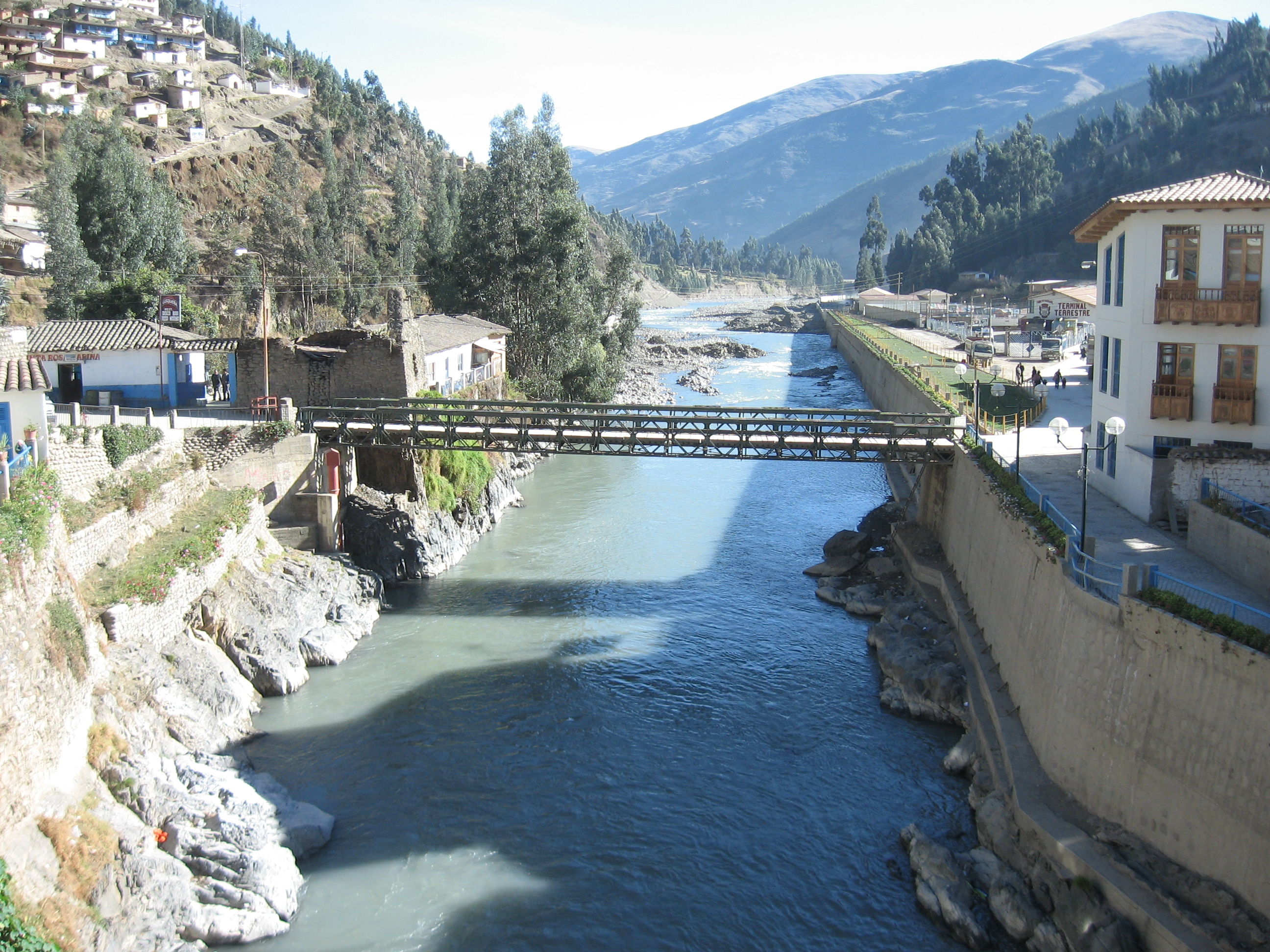 puente de paucartambo